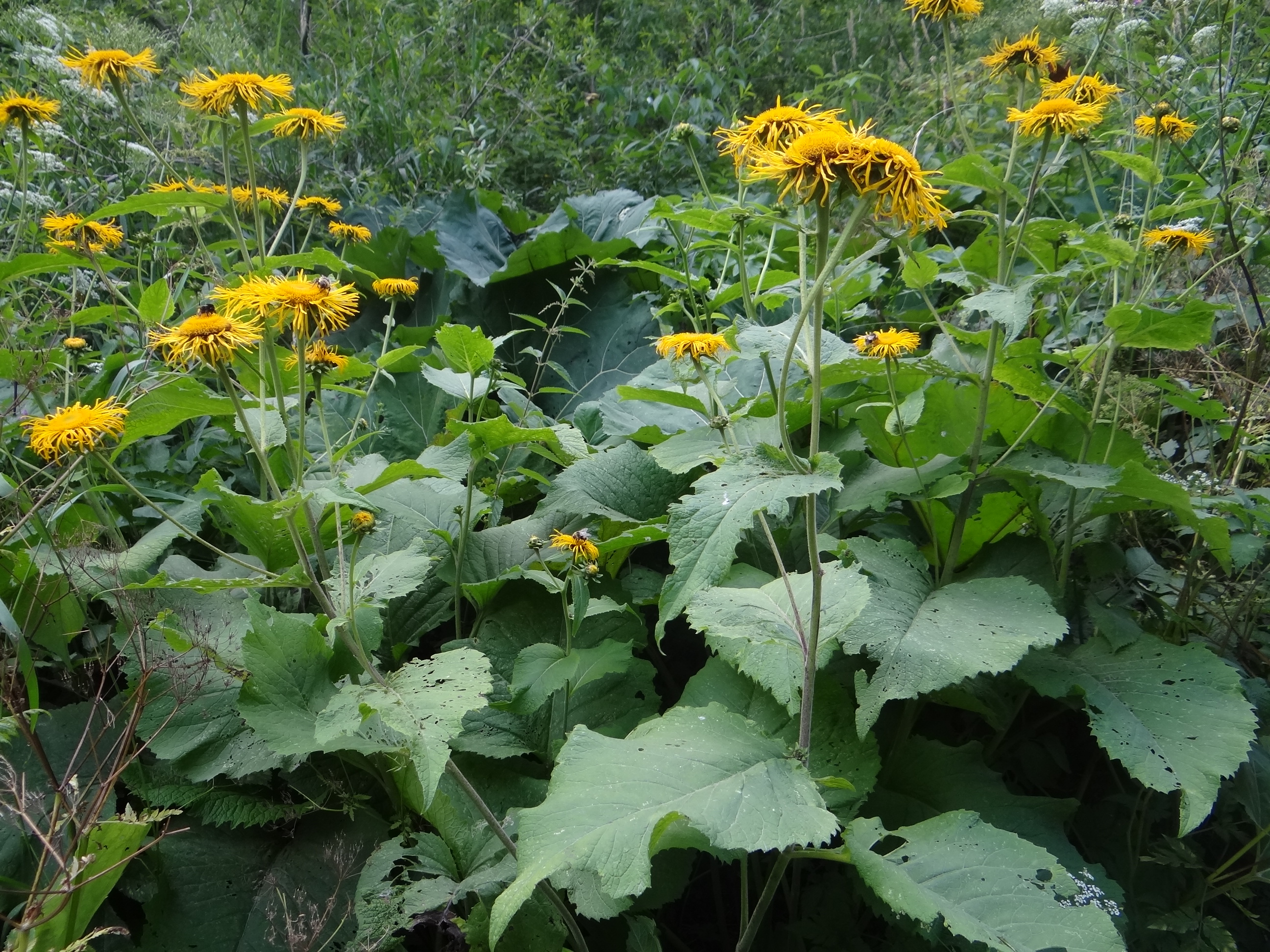 Telekia speciosa (location: Slovakia, Góry Choczańskie)